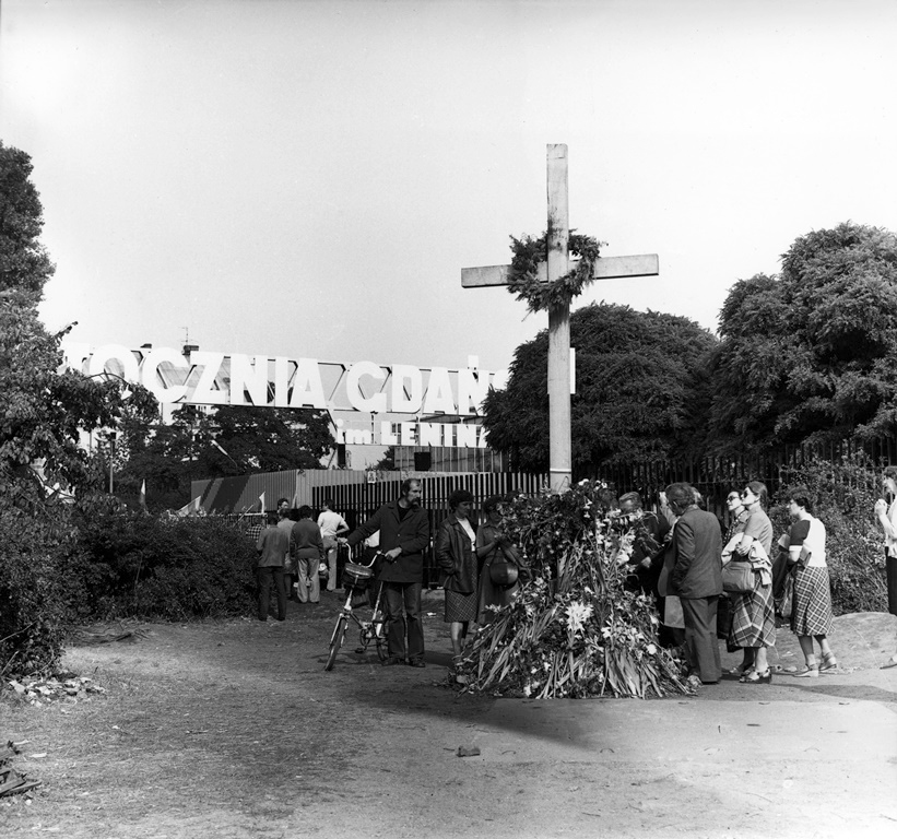 Drewniany krzyż, ustawiony przez strajkujących w miejscu, gdzie zginęli stoczniowcy w grudniu 1970 roku. Jednym z żądań strajkowych była budowa Pomnika Poległych Stoczniowców, który został odsłonięty w grudniu 1980. W głębi Brama nr 2 Stoczni Gdańskiej im. Lenina.